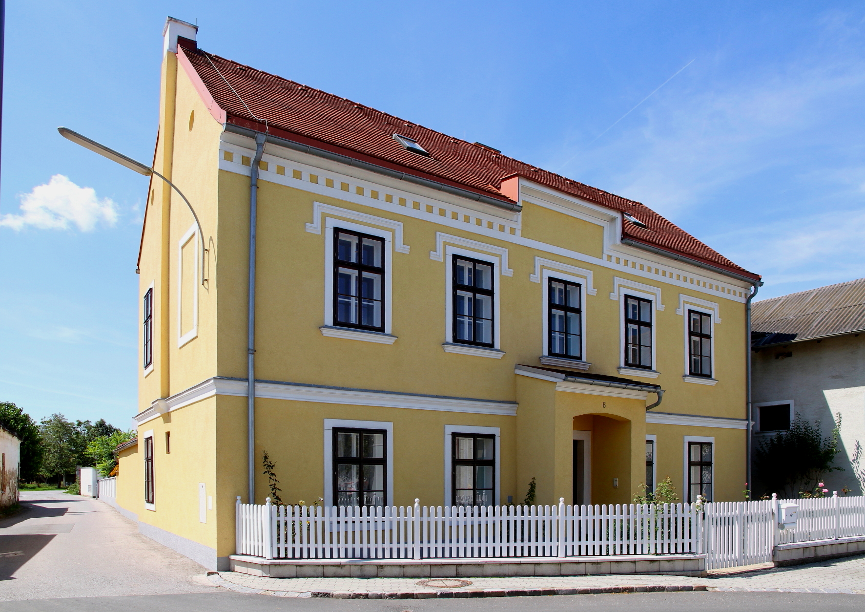 Die ehemalige Schule in der burgenländischen Gemeinde Leithaprodersdorf.